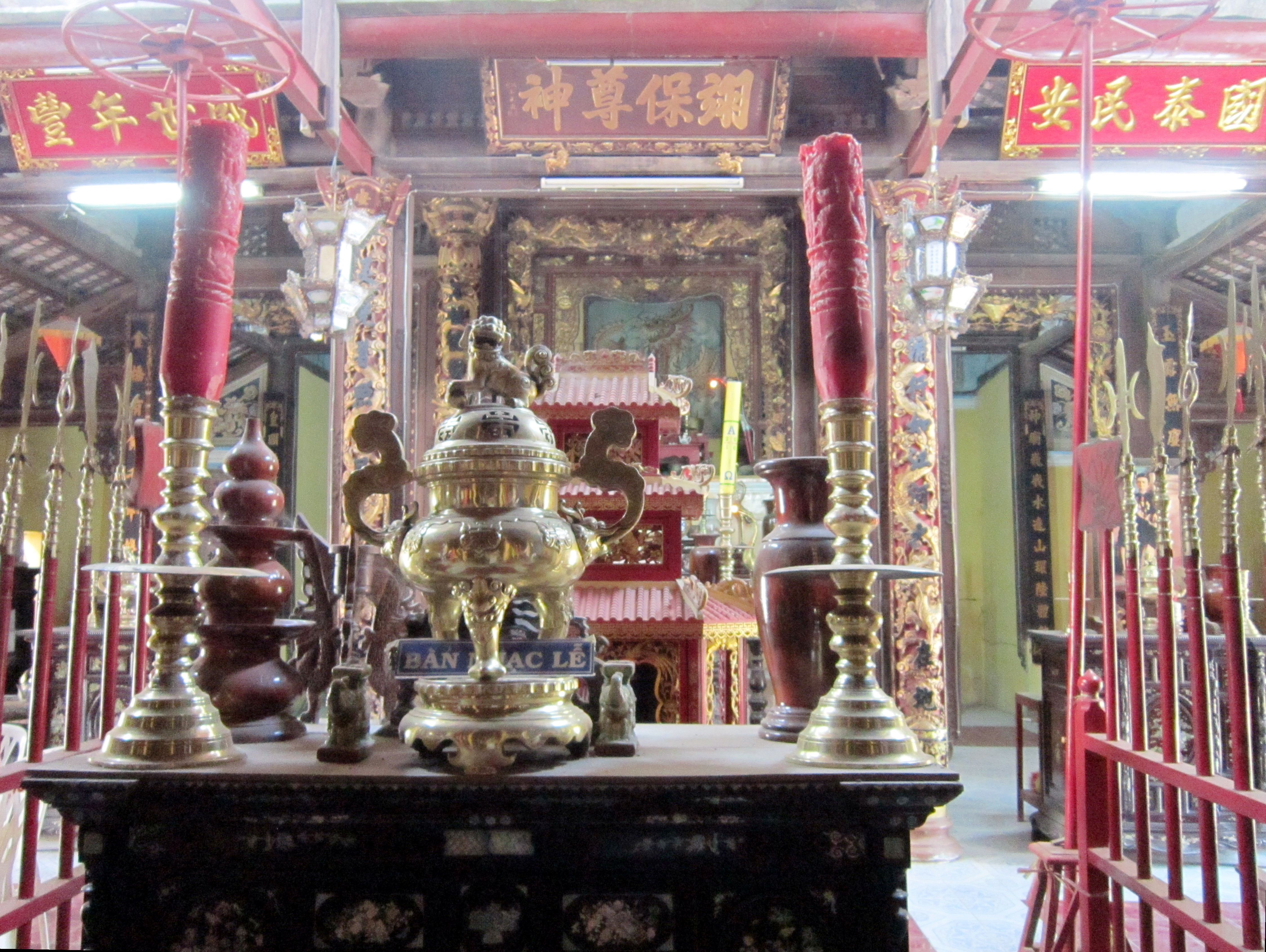 Gian thờ chính (đại điện) trong đình Vĩnh Ngươn tại xã Vĩnh Ngươn, thị xã Châu Đốc, tỉnh An Giang, Việt Nam.